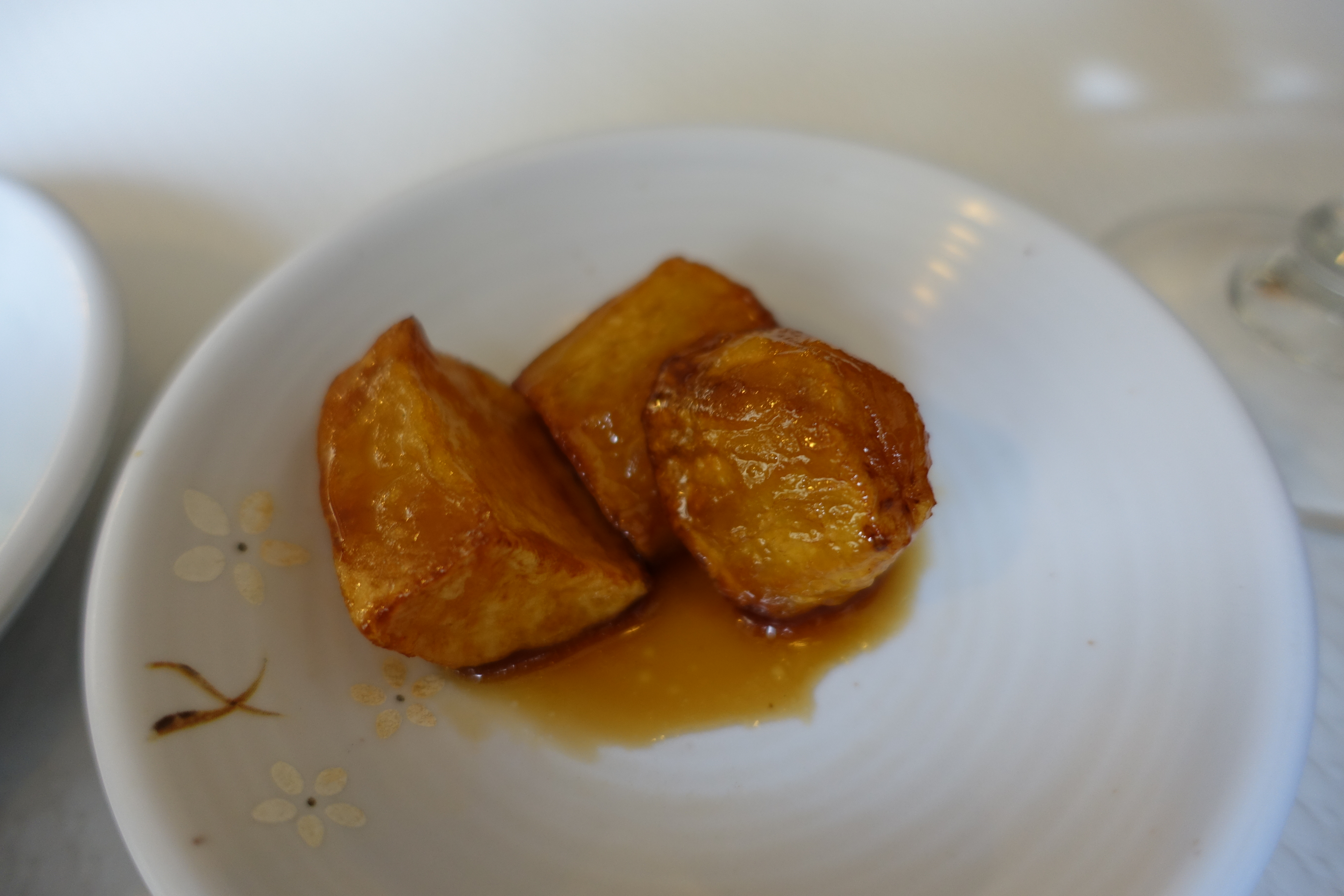 Banchan @ Kohyang @ Paris